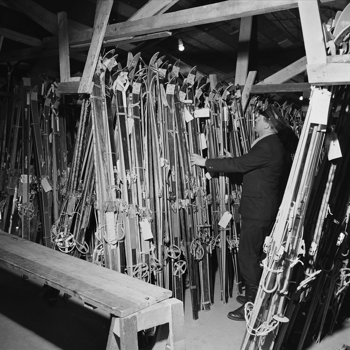 Ski behandlet som reisegods. Foto: Leif Ørnelund, fra Byhistorisk samling hos Oslo Musem (Digitalt musem).